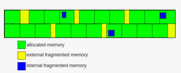 মেমরি ফ্রাগমেন্টেশন